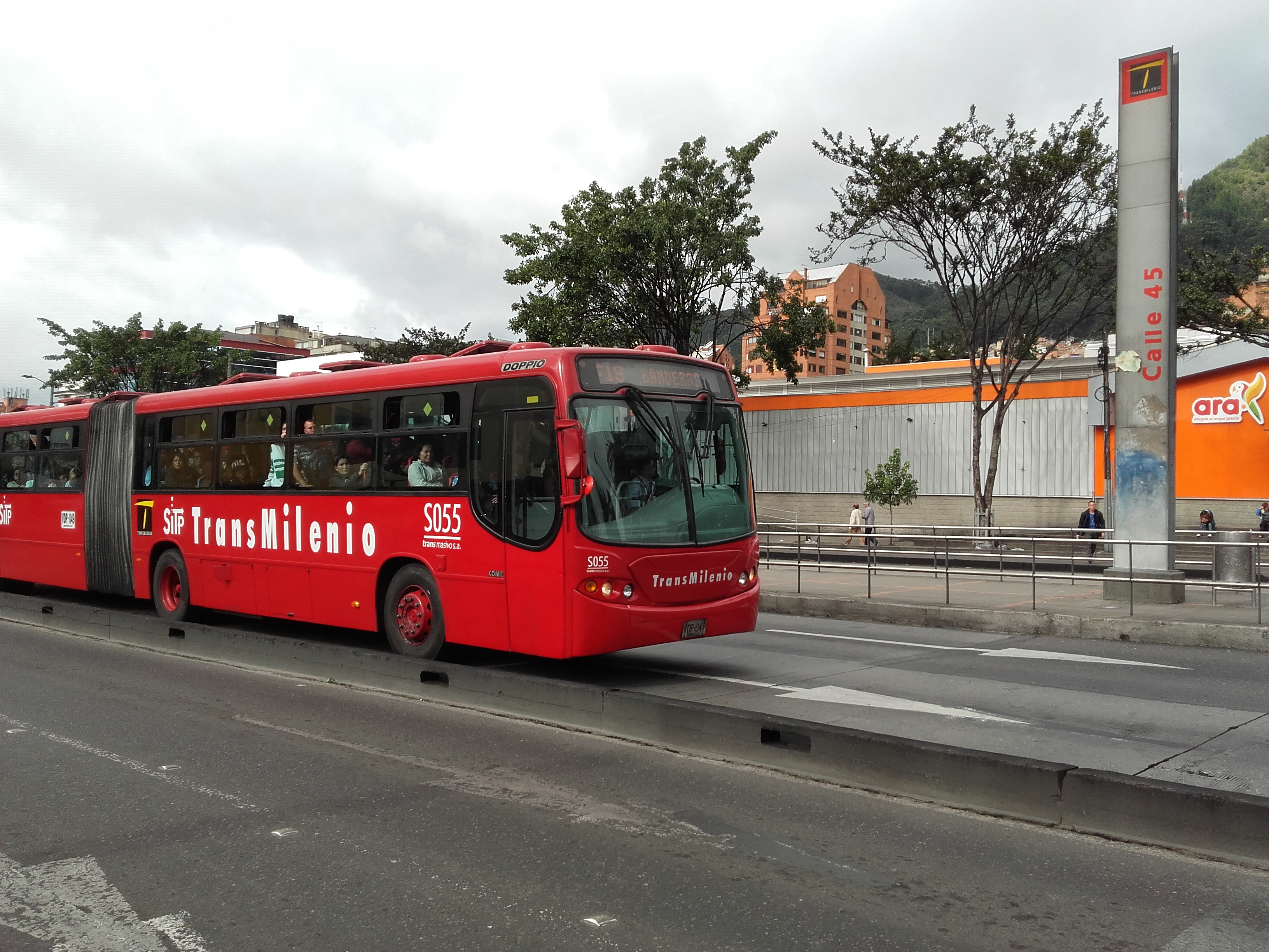 mdmenndndkkd